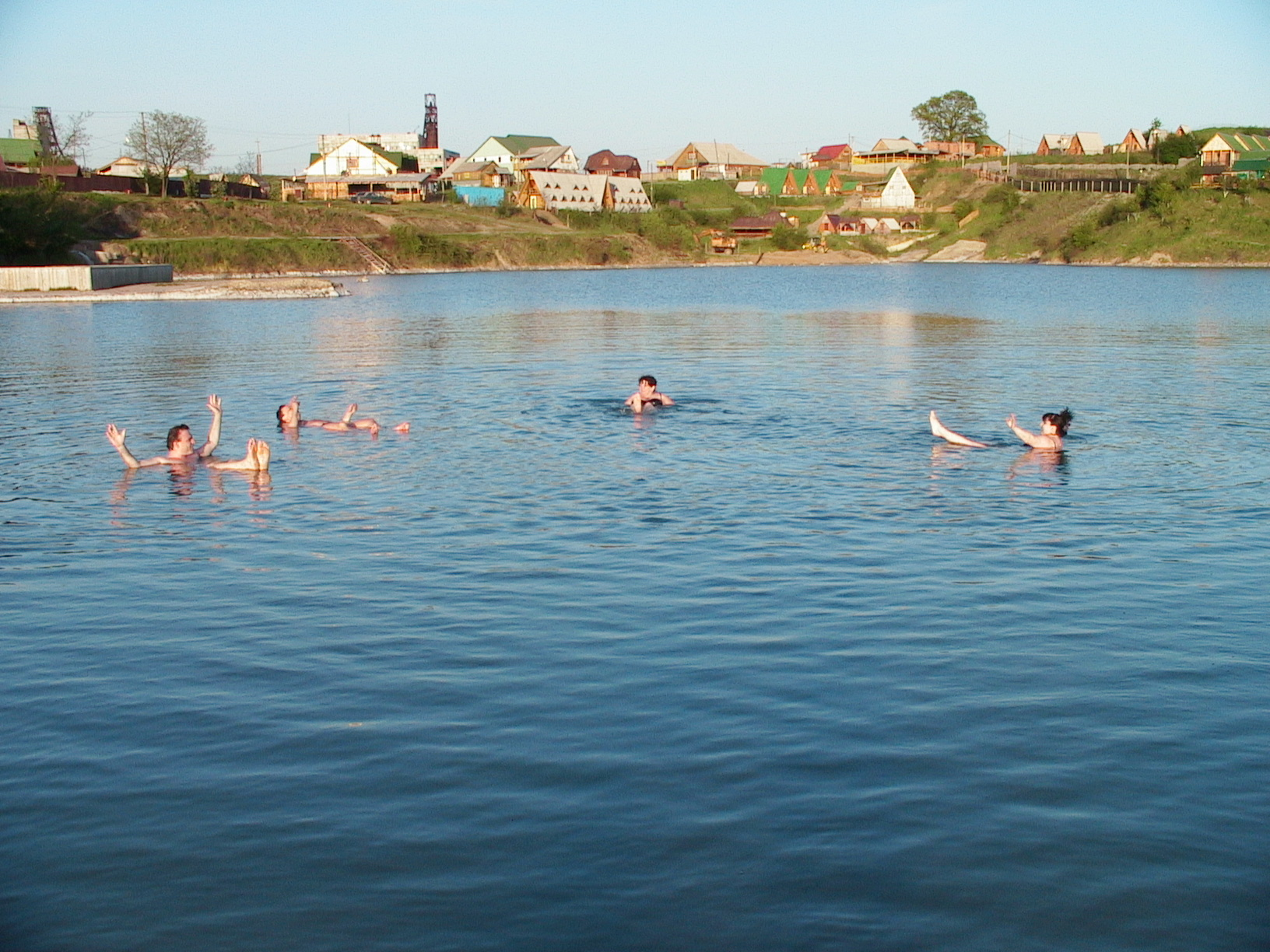 Озеро Кунігур в Солотвині